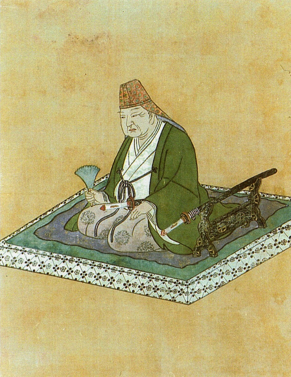 薩摩藩主・島津重豪の肖像画。